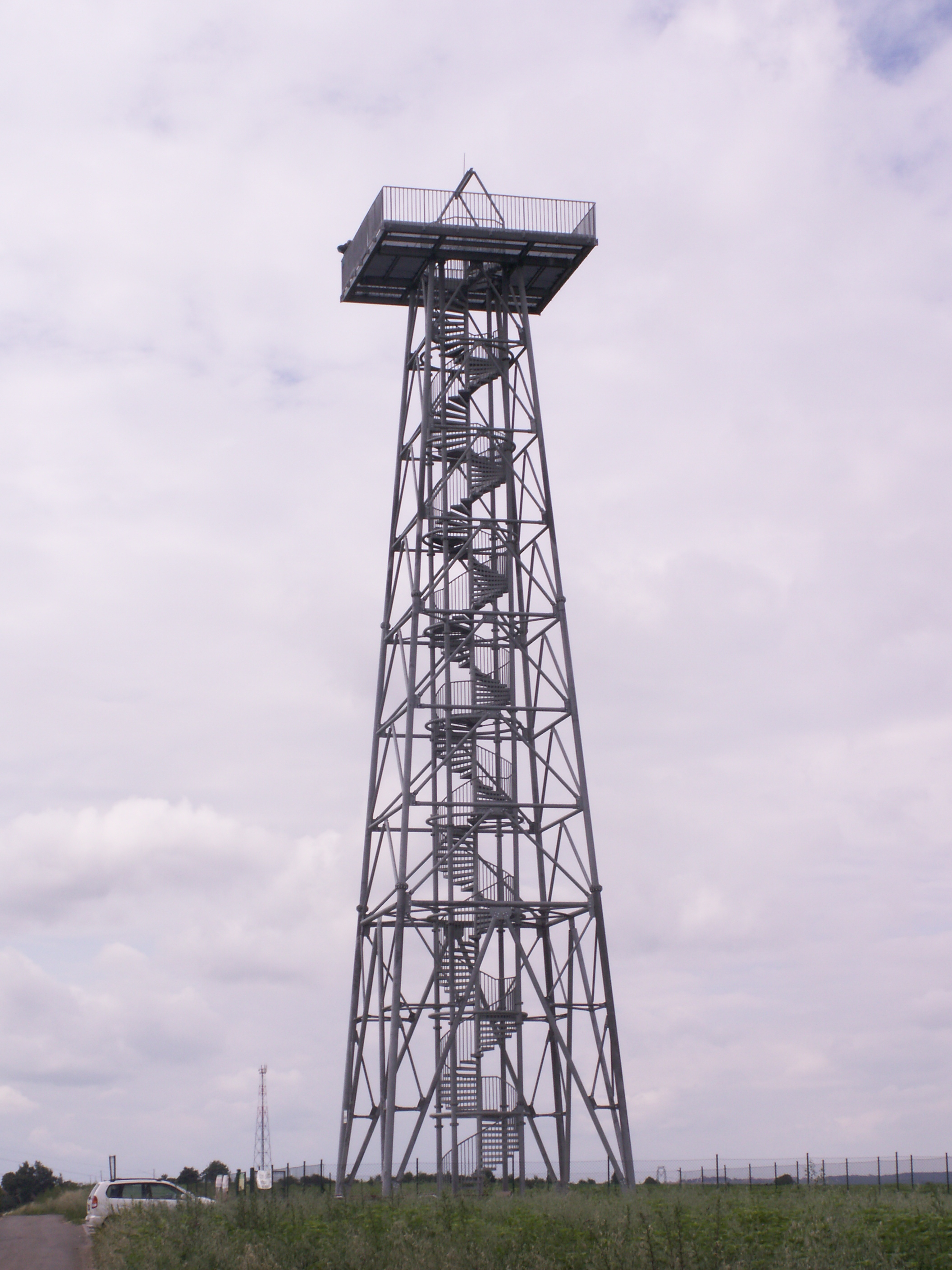 rozhledna Na Podluží (okres Hodonín)